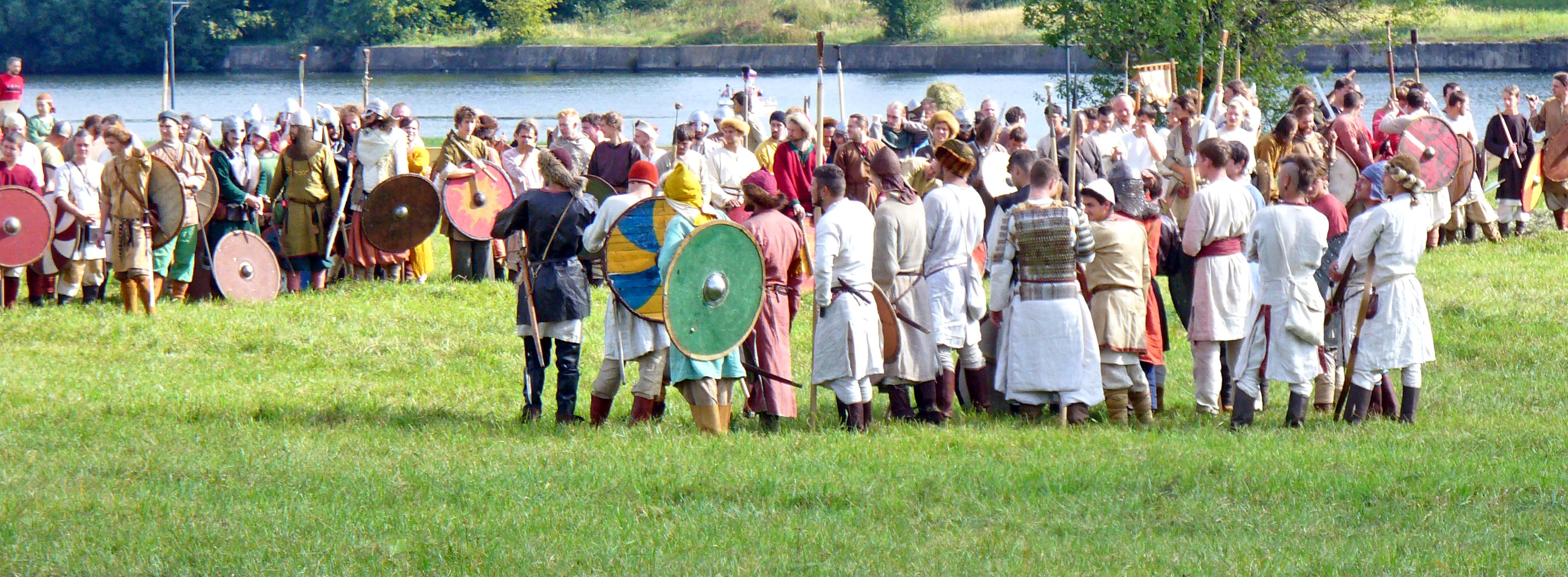 Фестиваль исторической реконструкции "Времена и эпохи" в Коломенском.